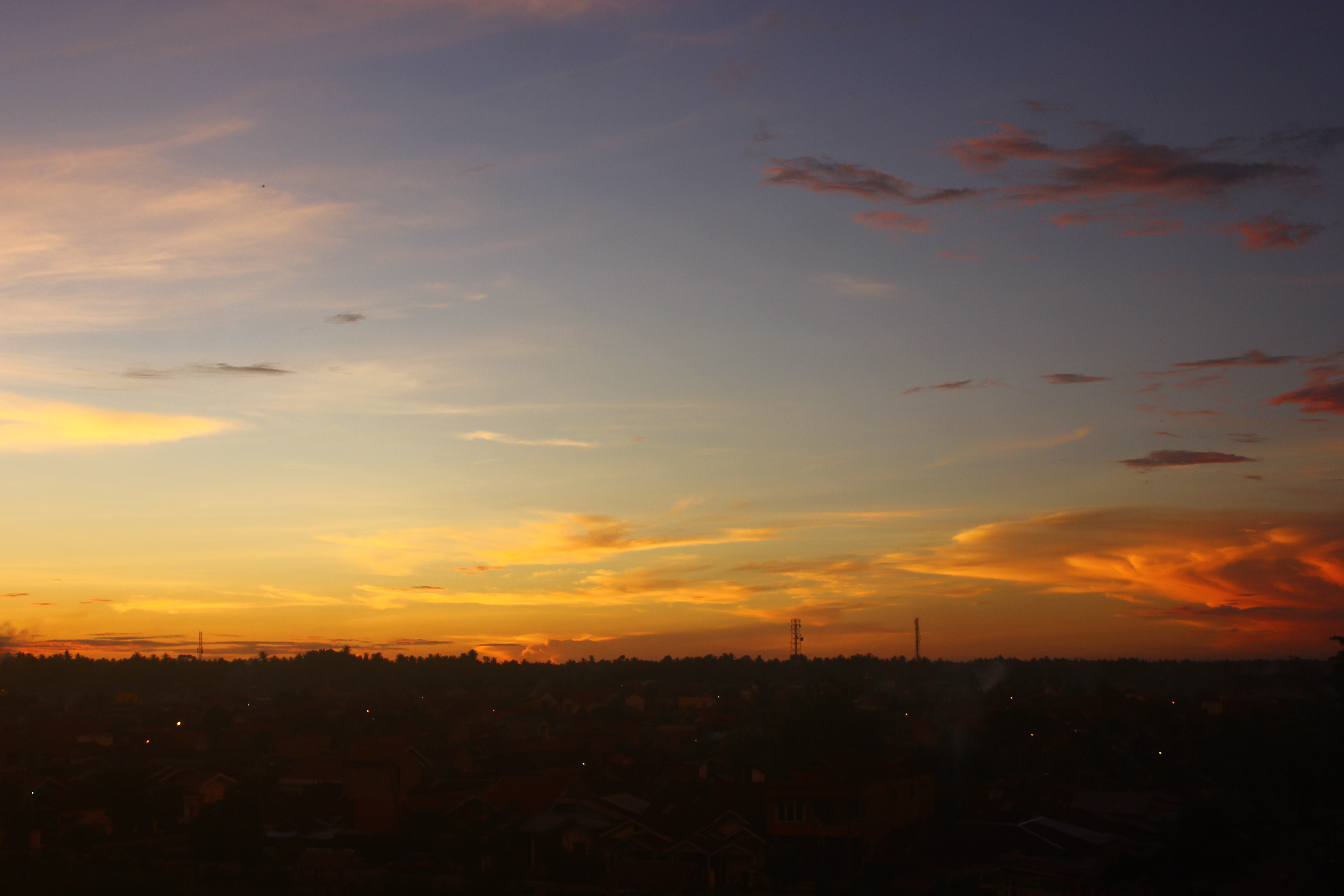 Senja di Lubuk Buaya Kota Padang